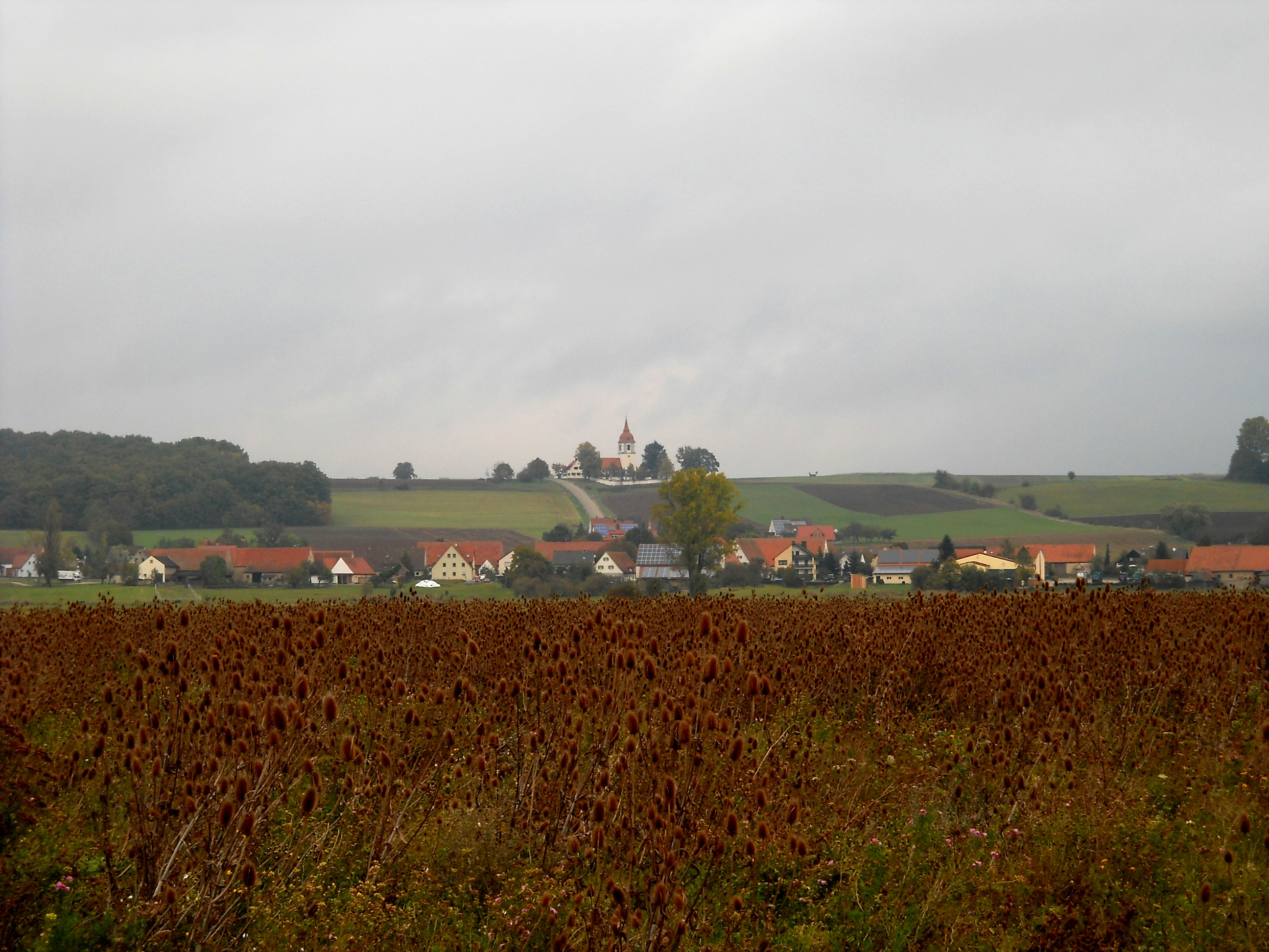 Unterasbach, Ortsteil von Gunzenhausen im mittelfränkischen Landkreis Weißenburg-Gunzenhausen (Bayern), Blick von der Altmühl aus auf das Dorf mit der darüber liegenden Kirche St. Michael